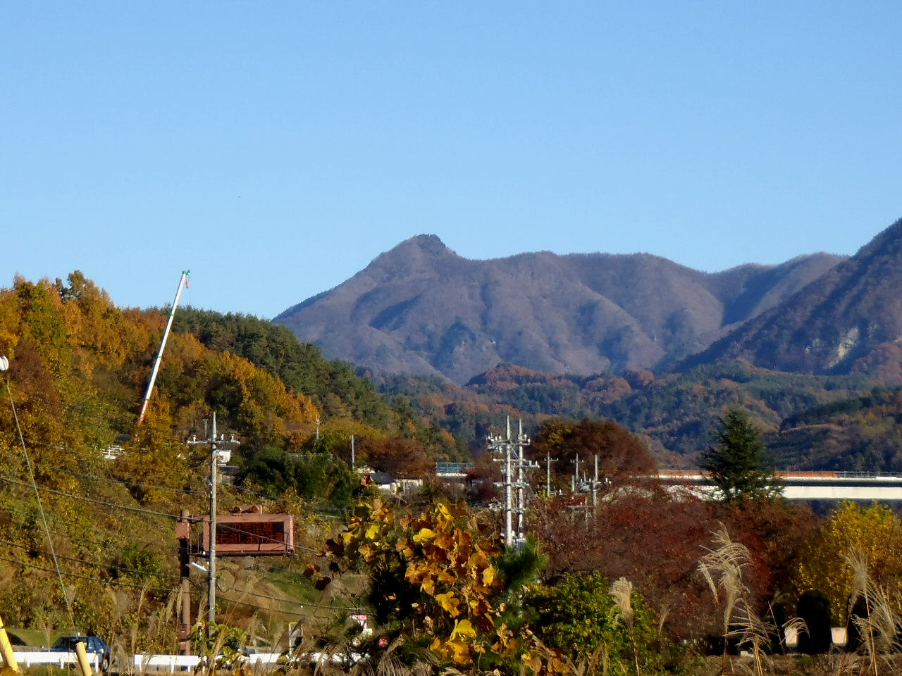 敷島地内上福沢付近から望む